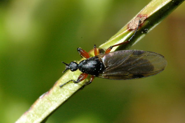 Picture taken in Commanster, Belgian High Ardennes . Species: female Bibio varipes